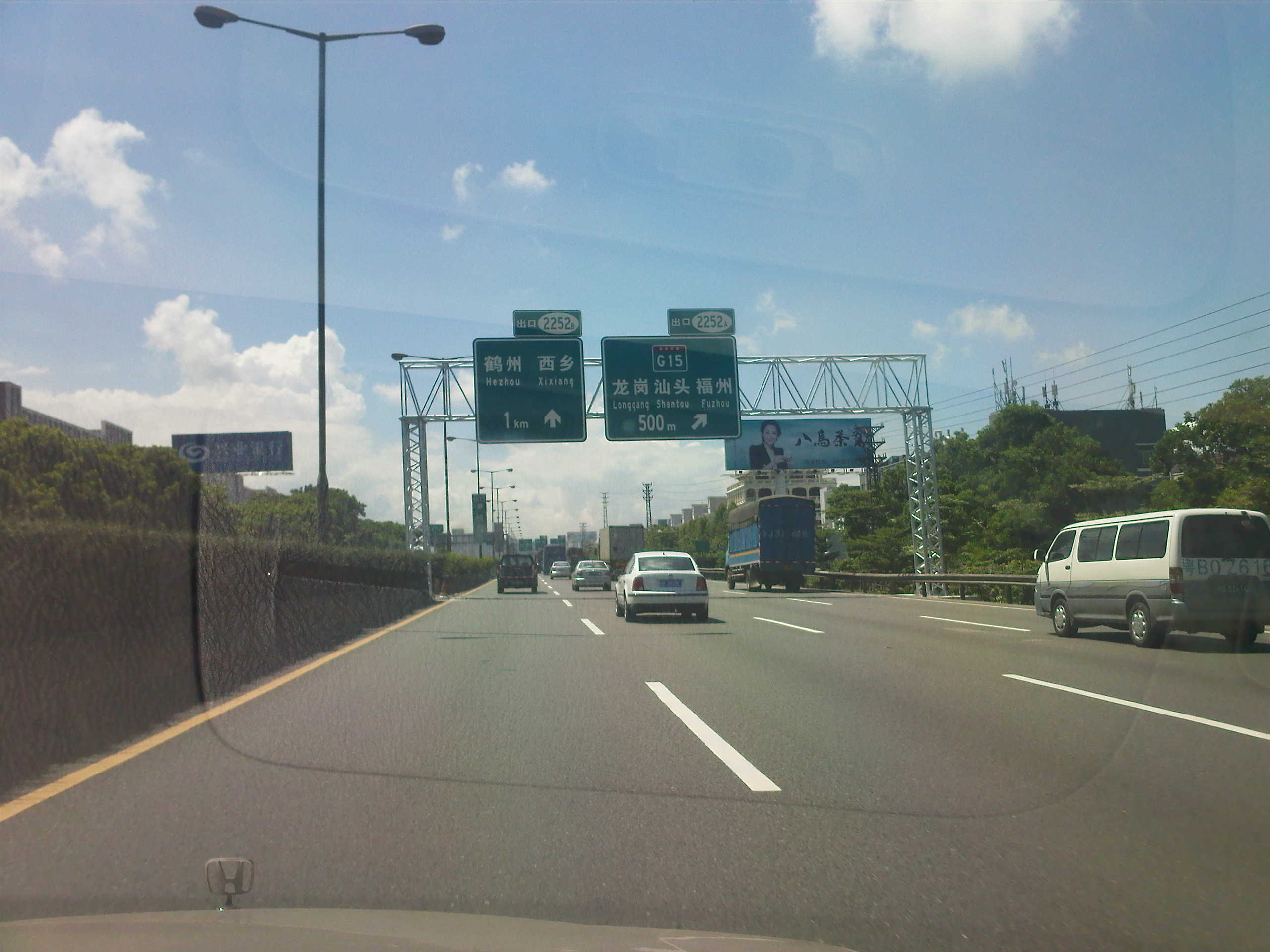 G4 (原廣深高速公路路段)與 G15（原機荷高速公路路段）之交匯點路標